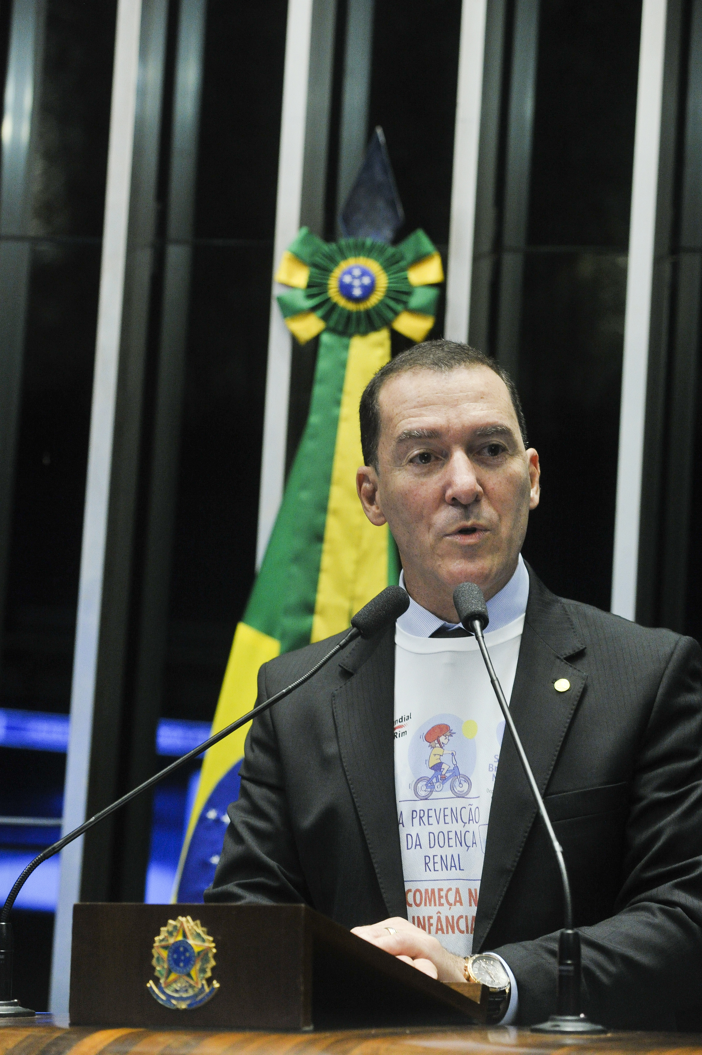 Sessão especial destinada a comemorar o Dia Mundial do Rim. Para o senador Eduardo Amorim (PSC-SE), que foi um dos autores do pedido, comemorar essa data é uma maneira de chamar a atenção para as doenças que afetam o órgão, como Em discurso, deputado Vinicius Carvalho (PRB-SP) Foto: Edilson Rodrigues/Agência Senado